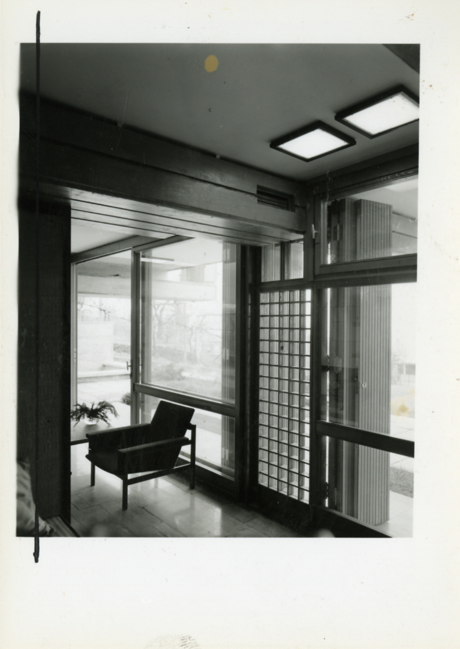 Lago Maggiore. Località non identificata. Architetto Roberto Morisi, Villa non identificata [Villa Lucia?]. Interni. Arredi. Servizio fotografico : Italia, 1961 / Paolo Monti. - Fototipi: 9 : Positivo b/n, gelatina bromuro d'argento/ carta, provino a contatto da pellicola 10x12. - ((Al verso dei provini manoscritti i numeri dei negativi corrispondenti secondo altra numerazione (quella delle buste): 33 (lo stesso numero identifica 2 provini - 2 copie), 34, 35, 36, 37, 38, 39, 40; timbro a inchiostro con data (1963) e copyright (Via Tasso - Milano). . - La suddetta serie è contenuta nella scatola dei provini identificata con il n. 174; sul coperchio iscrizione didascalica manoscritta a pennarello nero: "Provini". - Fonte: Rubrica di Paolo Monti: Archivio 10x12 (ultimi numerati) - dal G1 al (s.d.), presso Archivio Paolo Monti